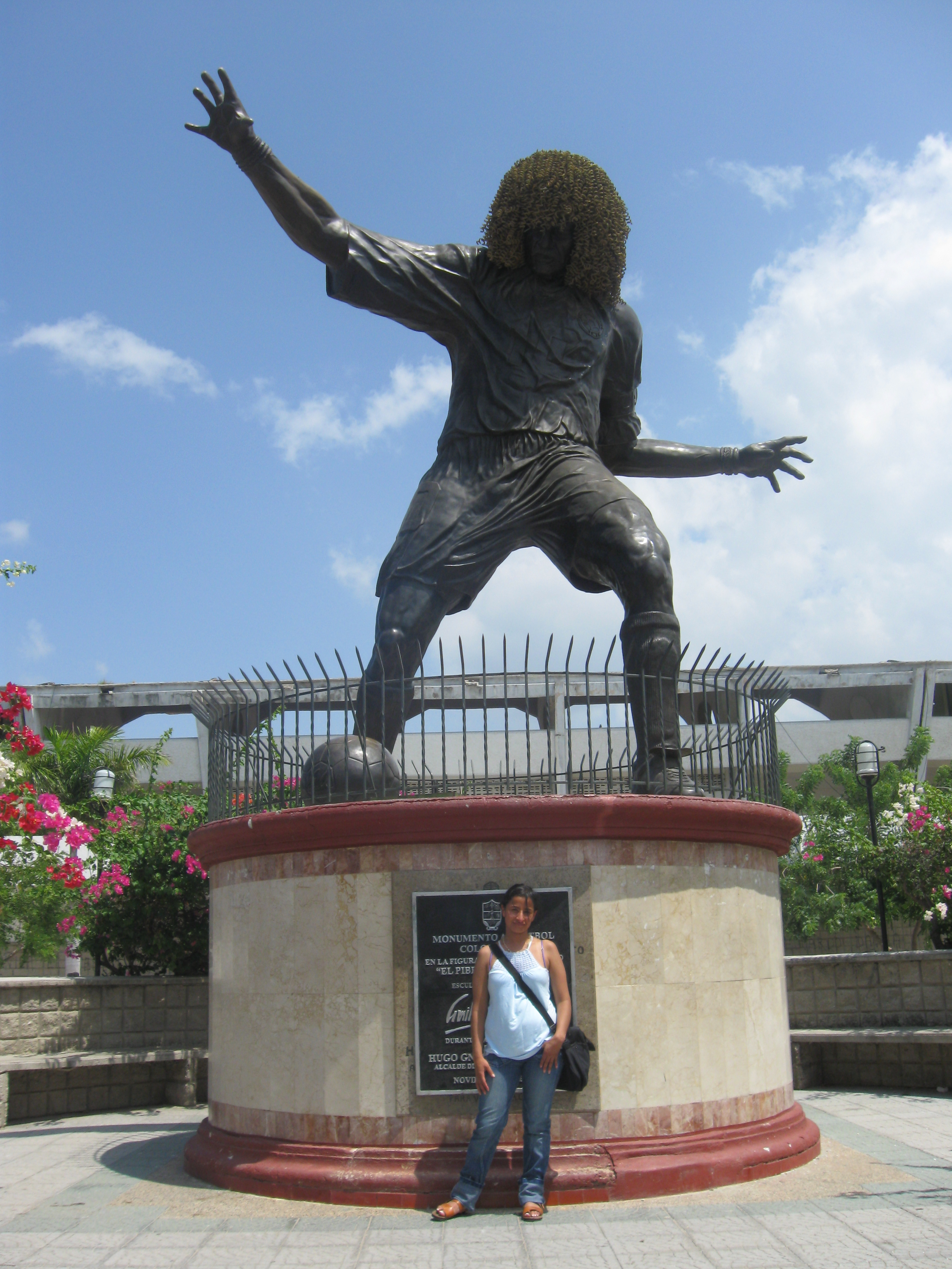 Estatua del Pibe Valderrama a la entrada del estadio de Santa Marta